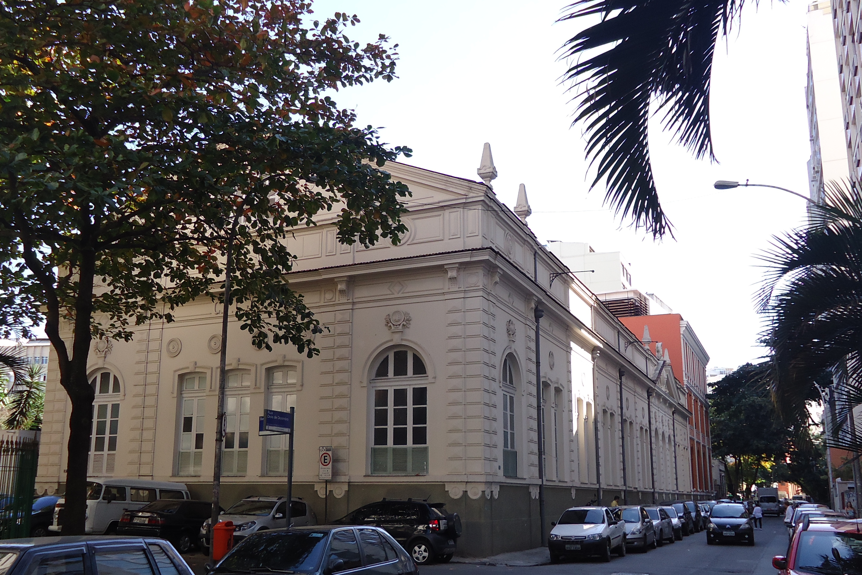 Prédio da Sala das Máquinas da Companhia Ferro-Carril do Jardim Botânico (1904), na Rua Dois de Dezembro, bairro do Flamengo, cidade e município do Rio de Janeiro, estado do Rio de Janeiro, Brasil.